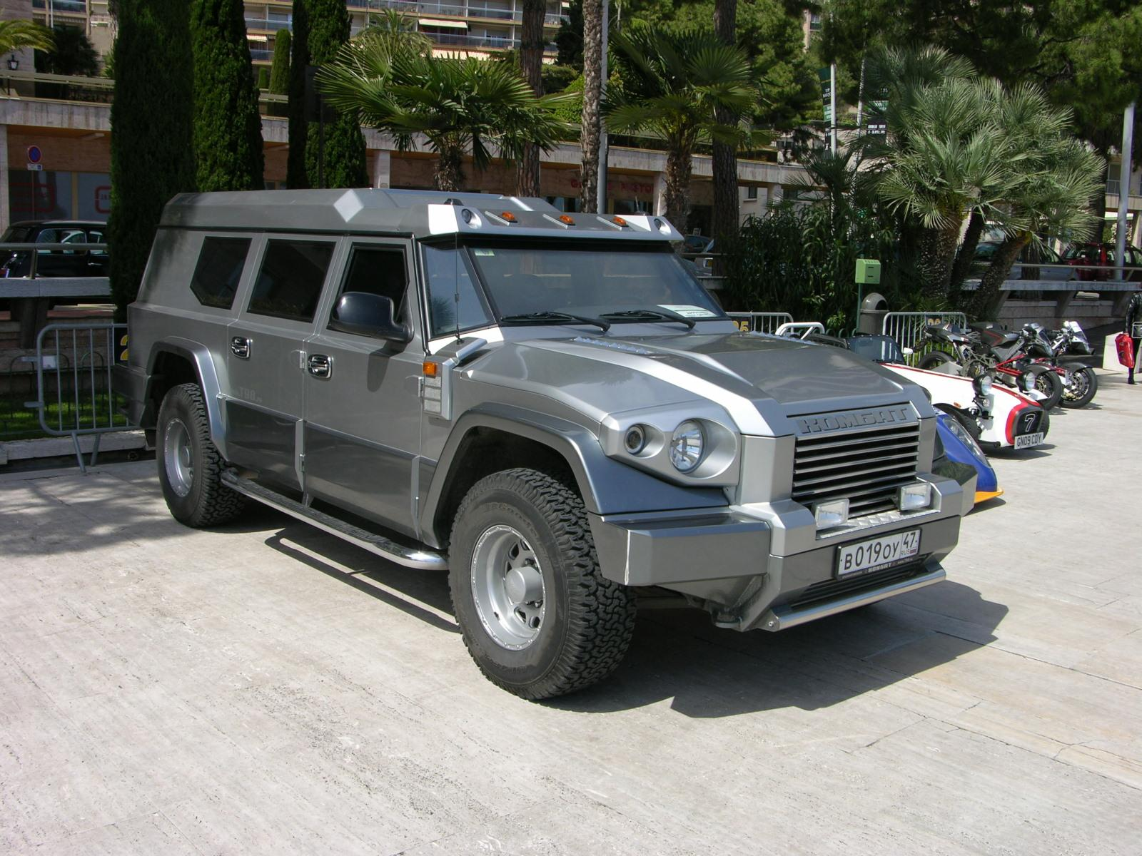 Dartz